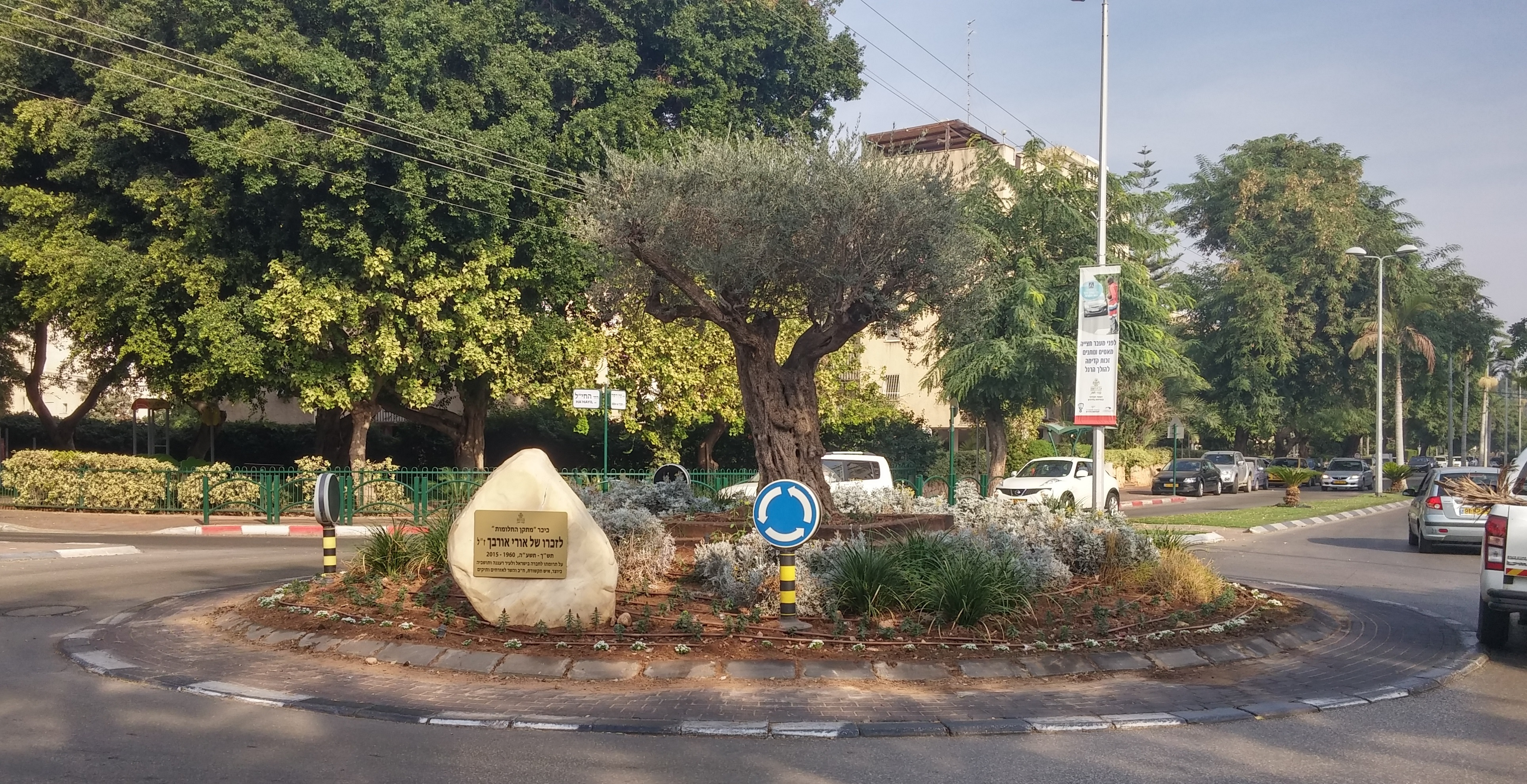 כיכר "מתקן החלומות" לזכרו של אורי אורבך, רעננה